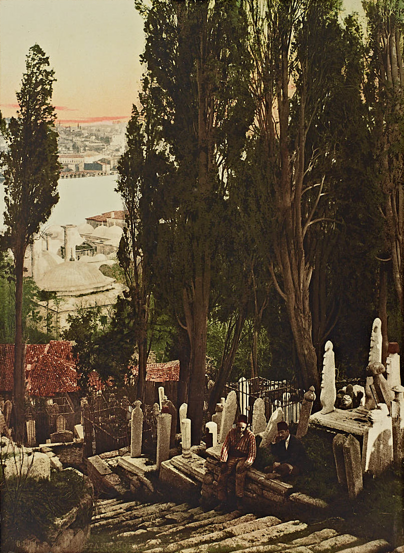 Eyüp Mezarlığı'nın 1899 yılına ait bir görüntüsü